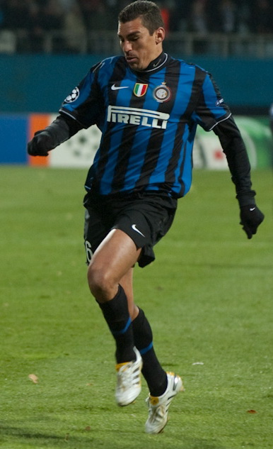 Lucio